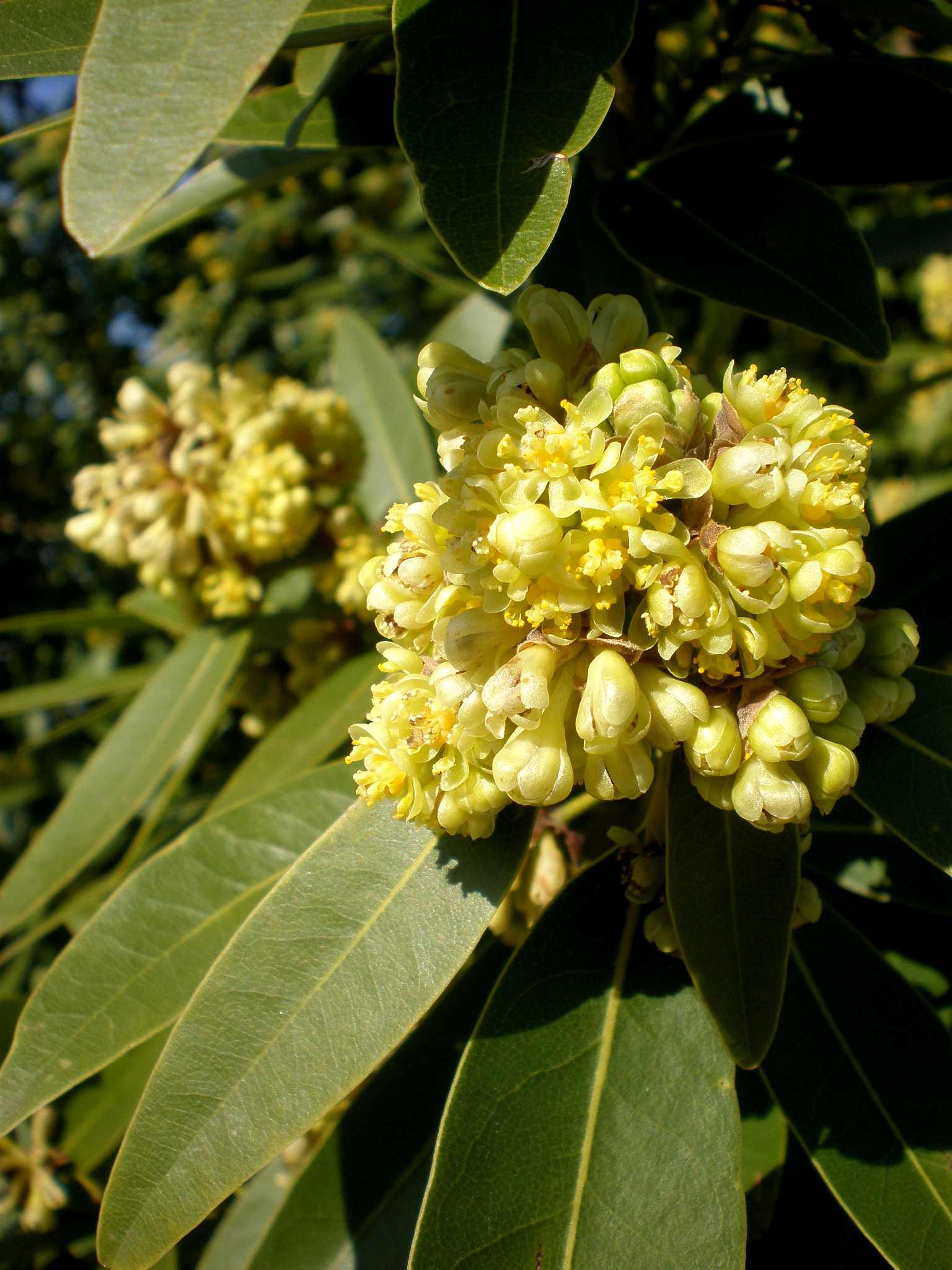 Jardín Botánico de Barcelona.